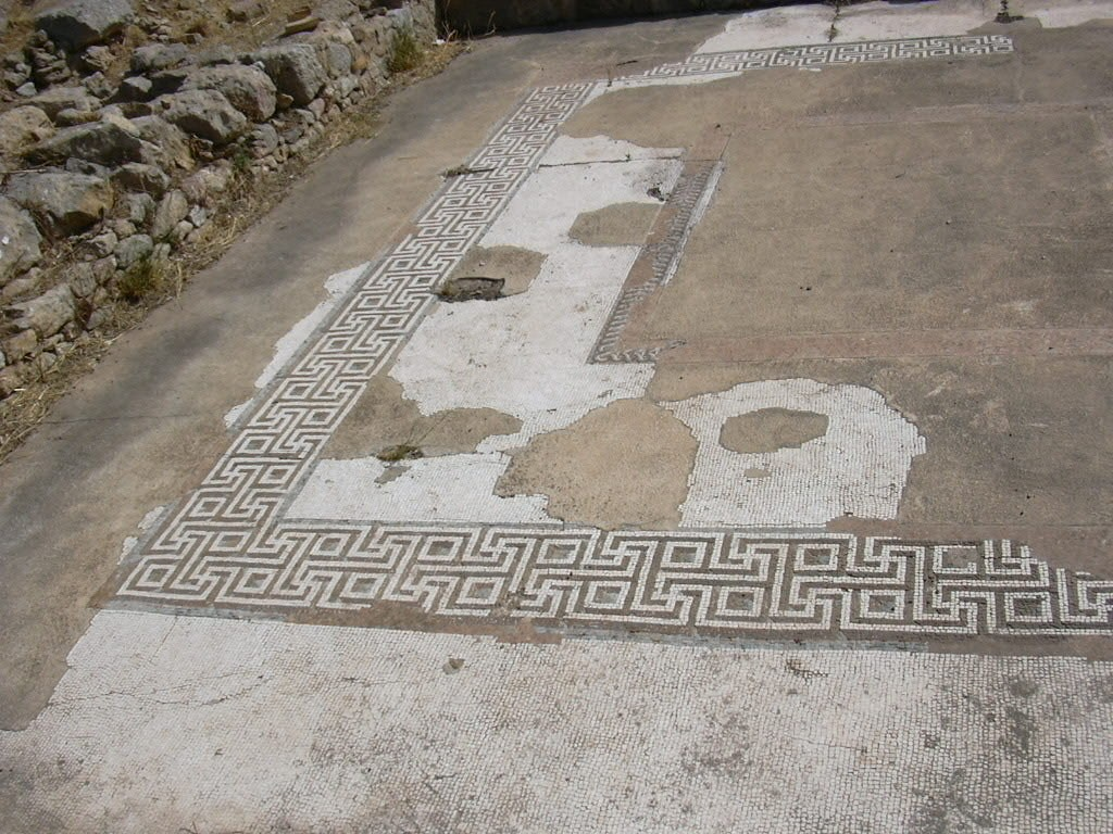 Morgantina- Sicilia: collina ovest, Casa Pappalardo